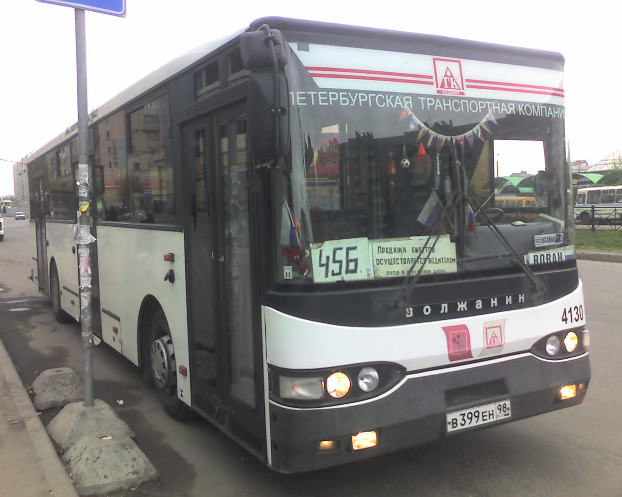 Автобус Волжанин-5270 ООО "ПТК" в Санкт-Петербурге. - Bus Volganin-5270, OOO "PTK", St. Petersburg